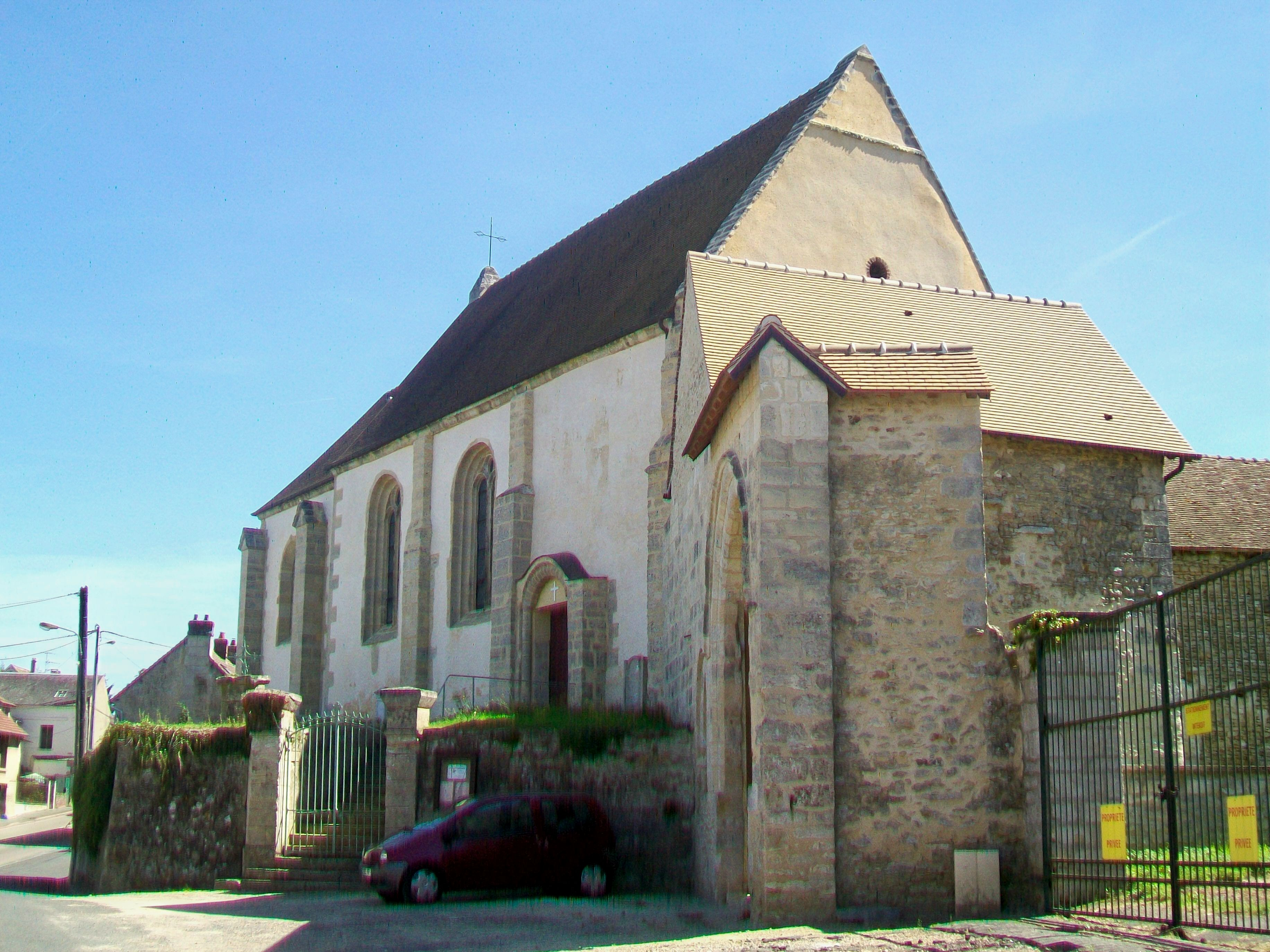 Vue de l'église depuis le nord-ouest ; à gauche, le portail de la cour d'une ferme mitoyenne à l'église (façade sud).